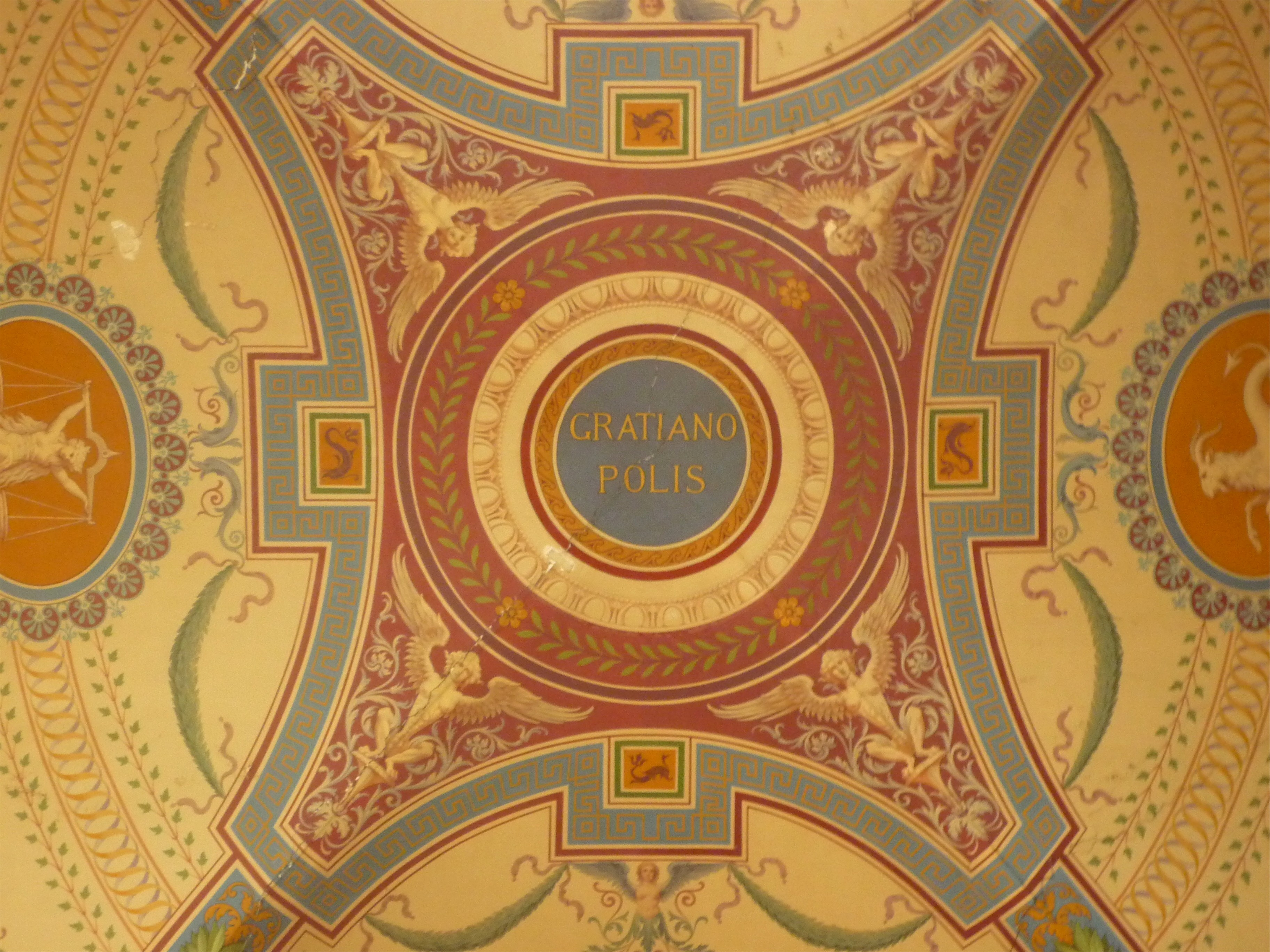 Plafond vestibule du musée-bibliothèque de Grenoble - Gratianopolis nom antique de Grenoble à partir de 381.